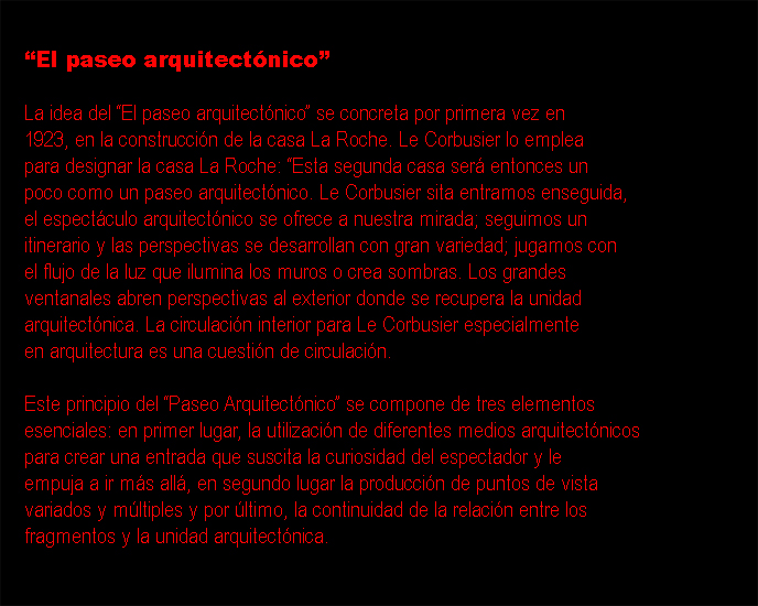 paseo arquitectonico